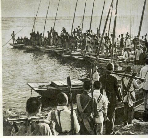 1944年8月冀中八路军在夏季攻势中，从文安洼登船向渤海进军